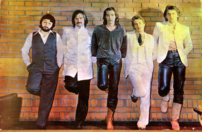 Цветы 1983 г.